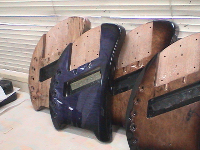 koyabu board bodys